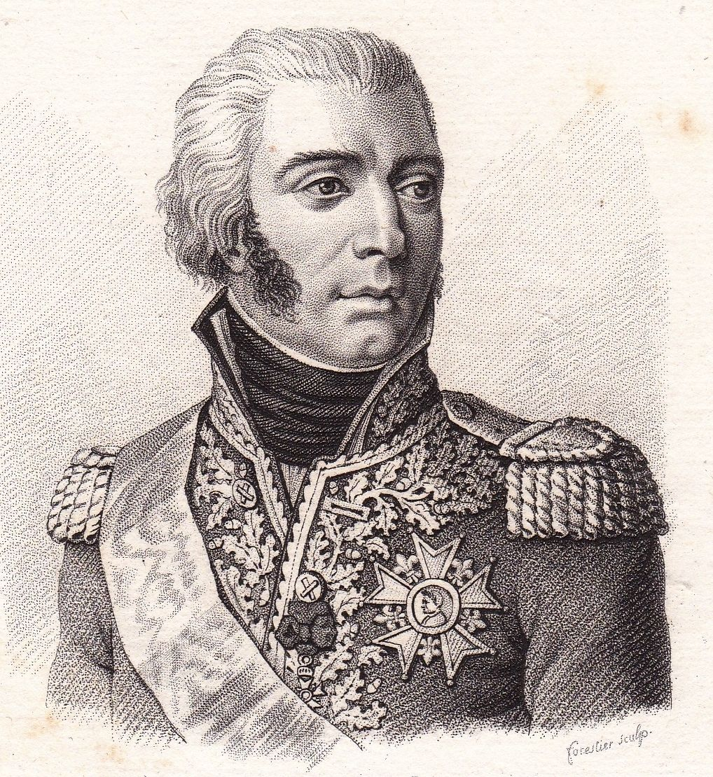 Jean Baptiste Bessières (1768–1818), Herzog von Istrien, Marschall von Frankreich